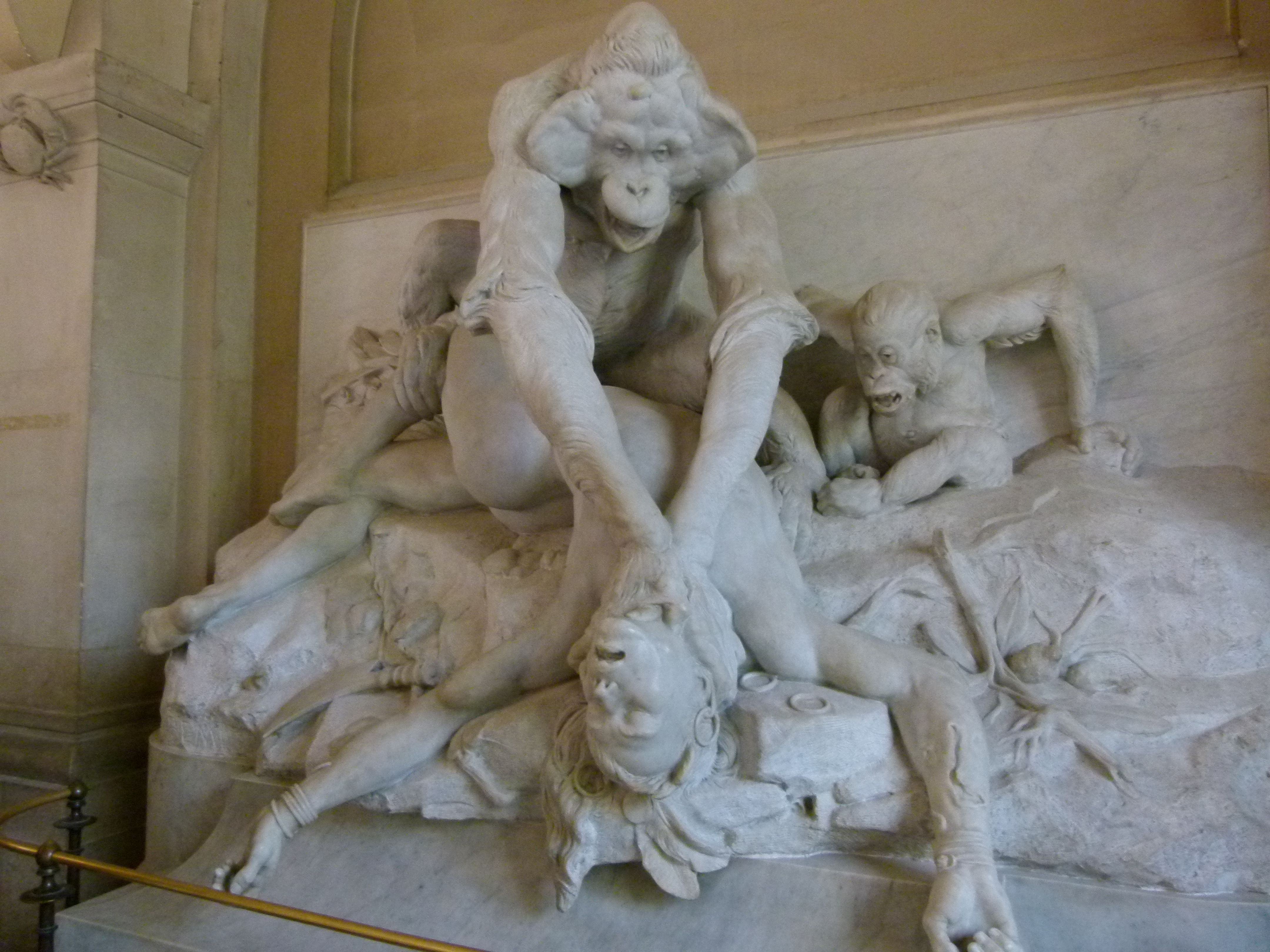 Sculpture "Orang-outang étranglant un sauvage de Bornéo" au Jardin des Plantes à l'entrée de la galerie de paléontologie